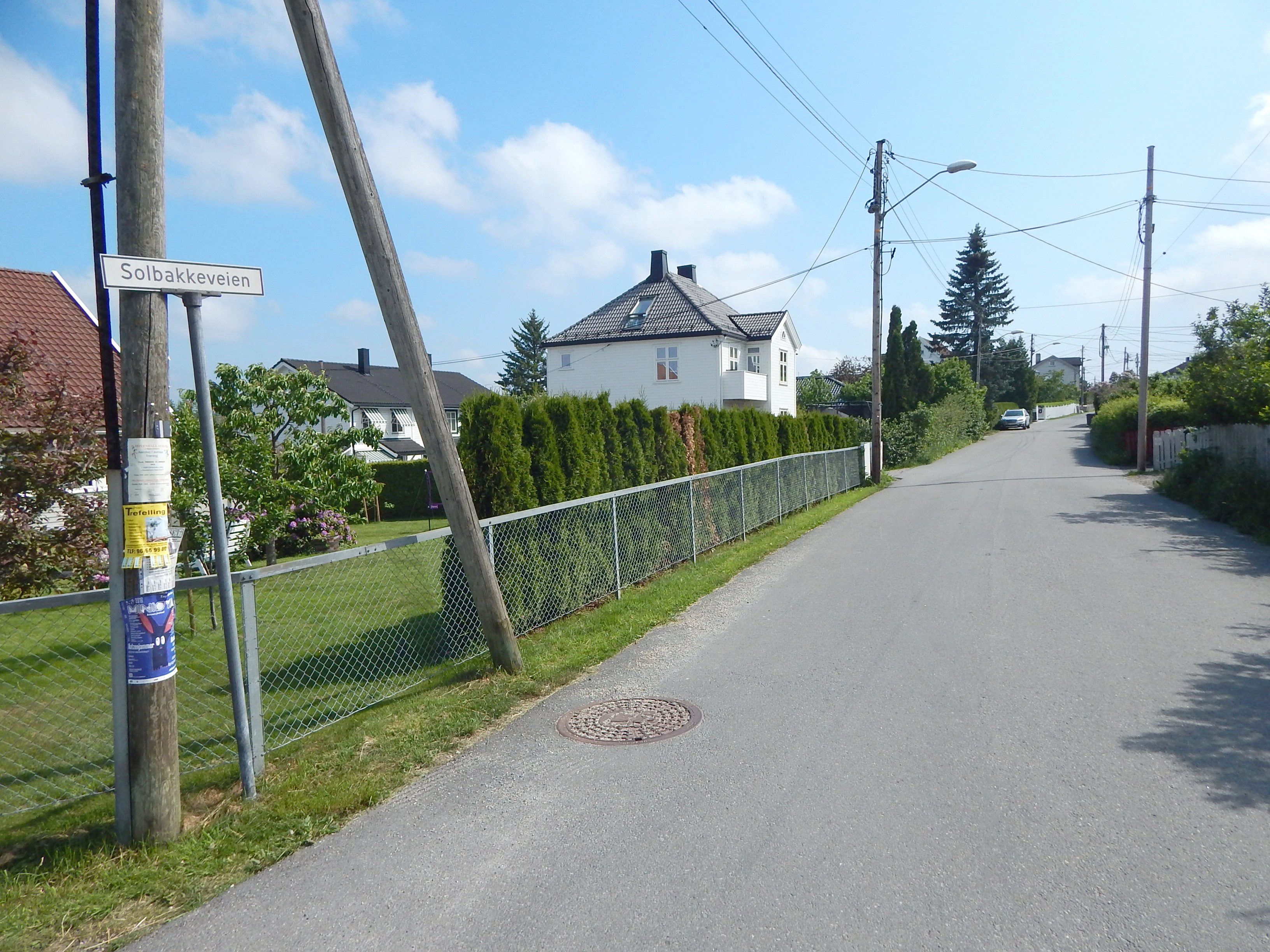 Solbakkeveien sett fra Kildals vei